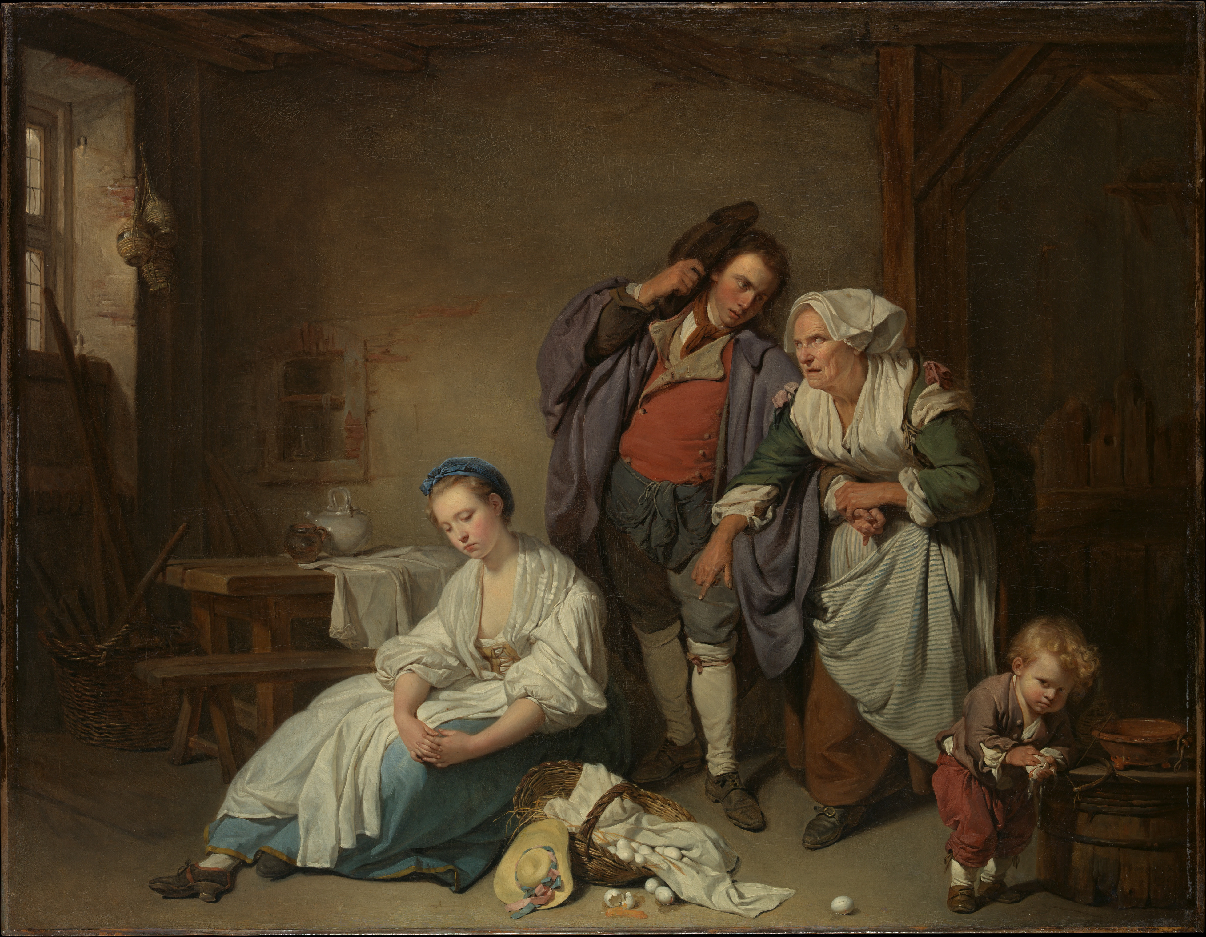 Painting; Paintings